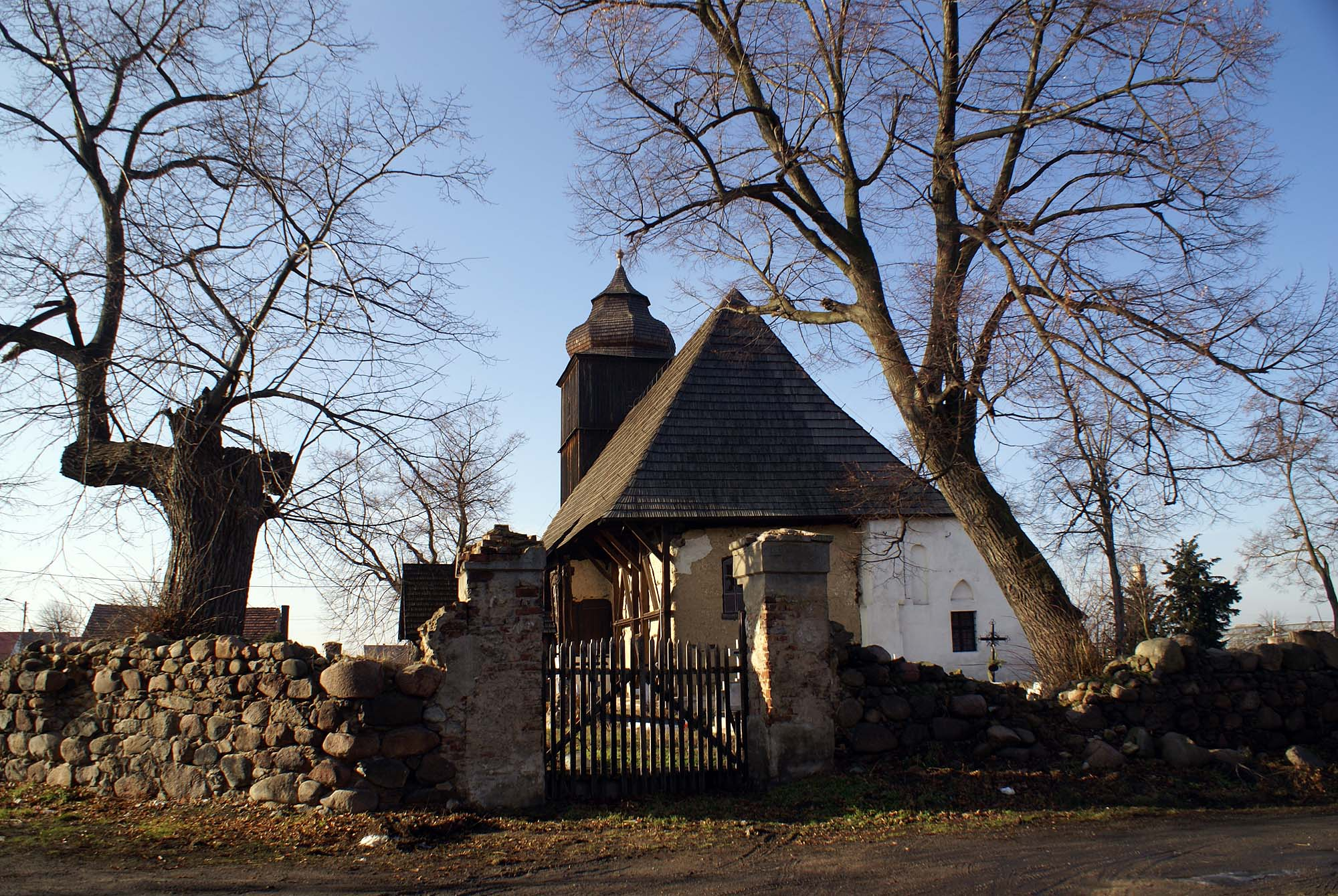 Obórki, kościół ewangelicki, ob. kościół polsko-kat. p.w. śś. Piotra i Pawła, XVII, 1755